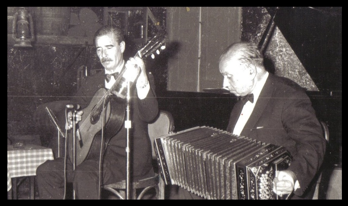 Edmundo P. Zalidivar (H) tocando la guitarra junto a Ciriaco Ortiz en el Viejo Almacen (8/07/1970)